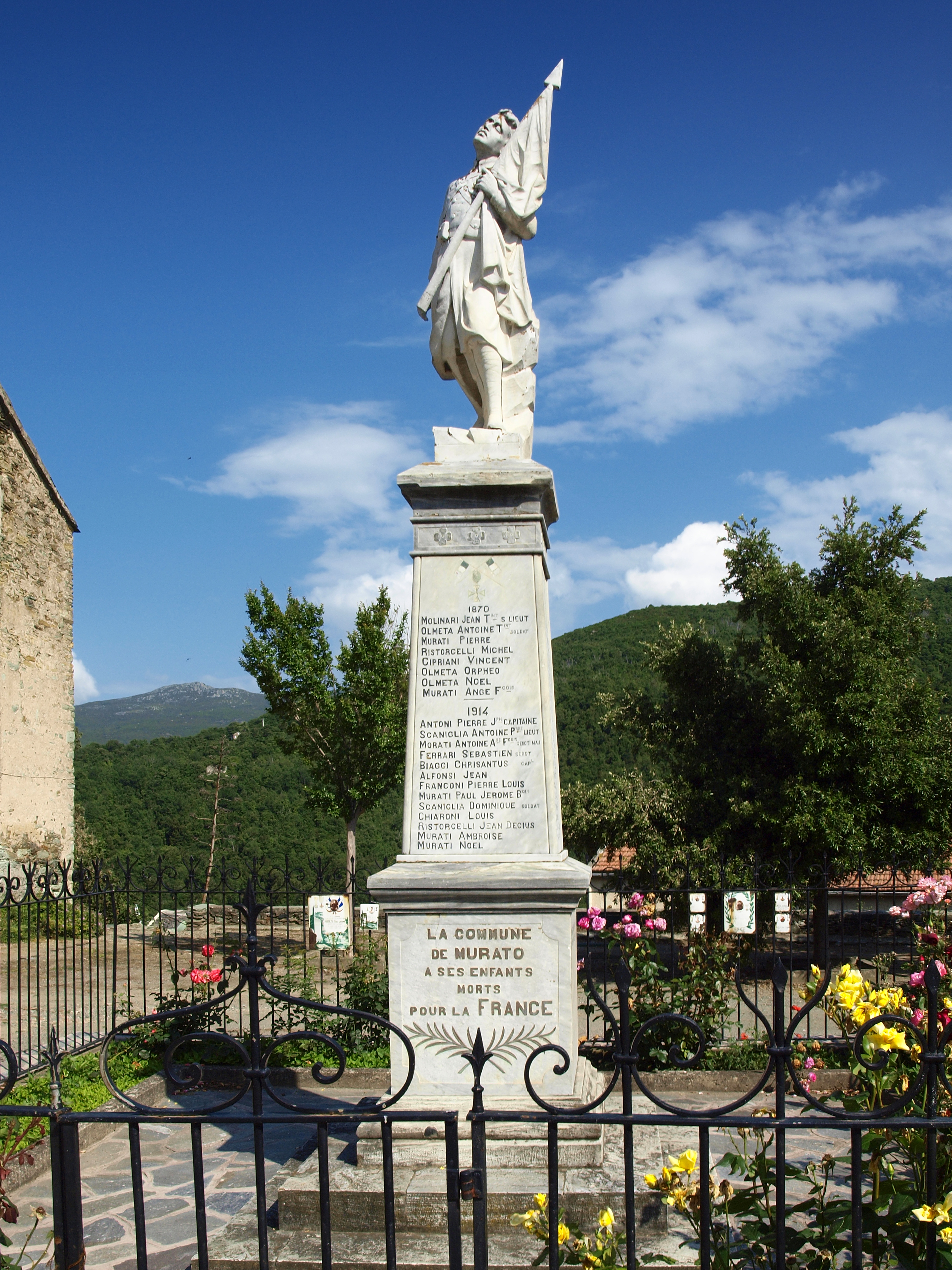 Murato (Corsica) - Monument aux morts